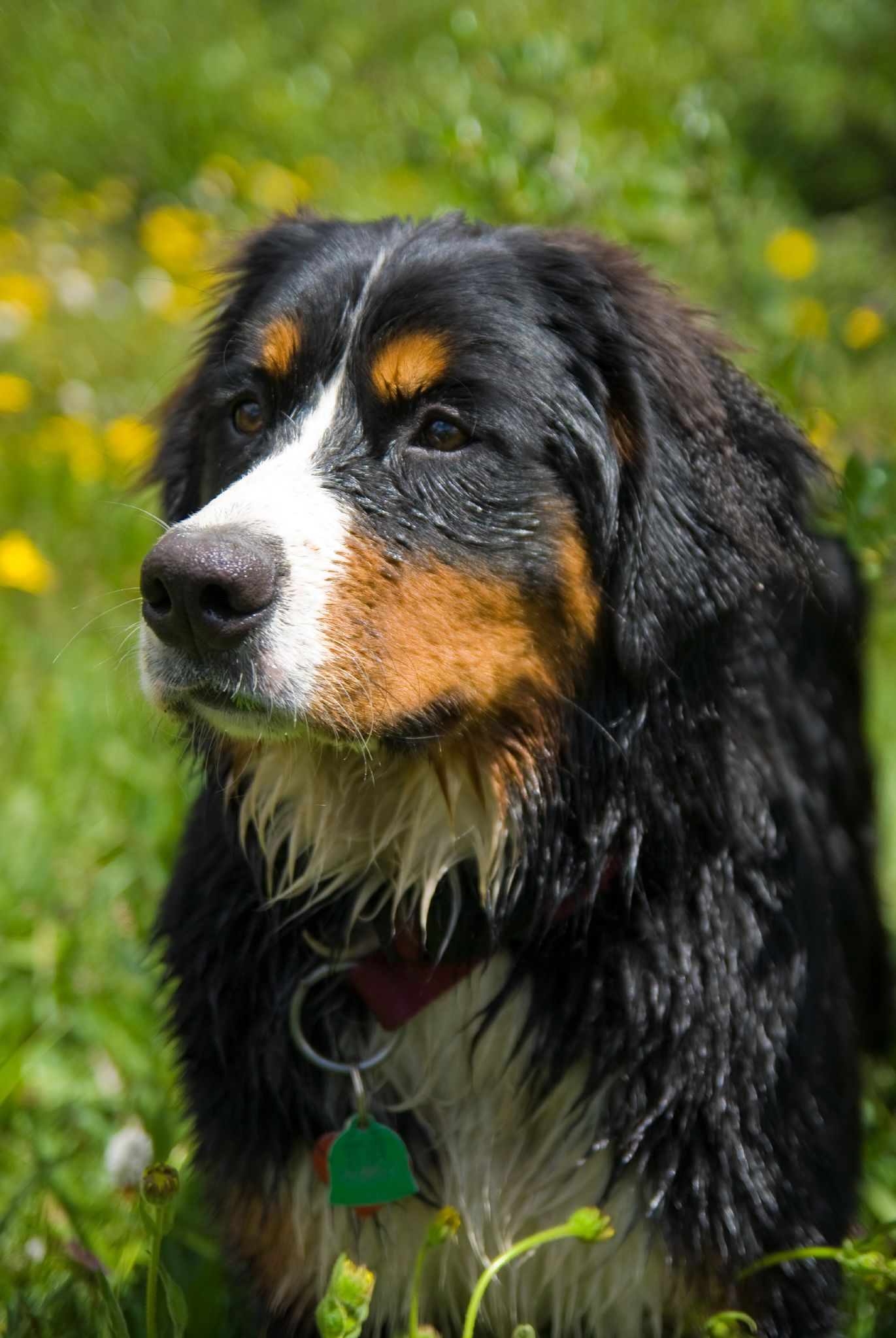 A Bernese Mountain Dog (Berner Sennenhund).20070717-472